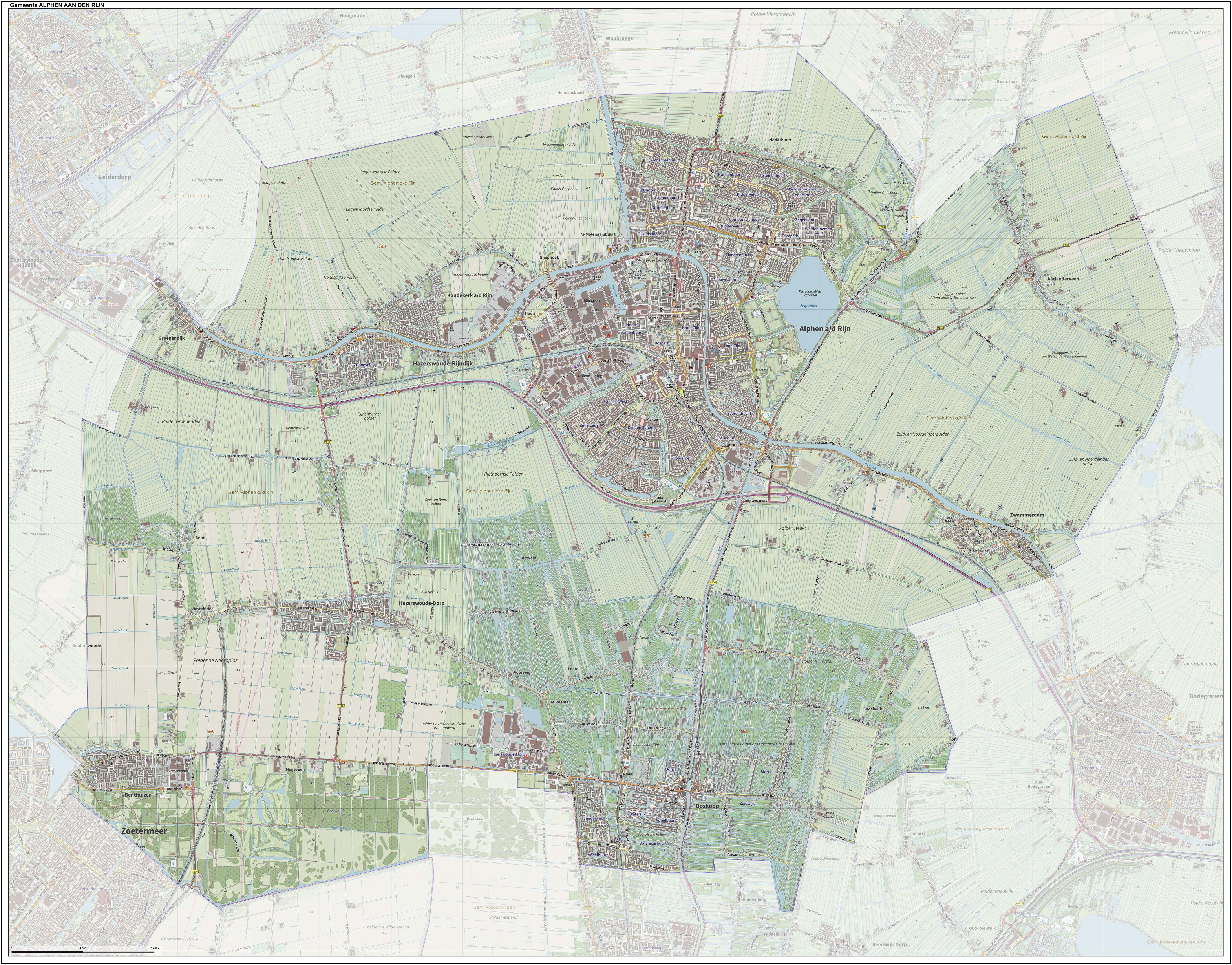 Topografische gemeentekaart. Resolutie: 400 pixels/km. Kaartbeeld samengesteld uit de open geodata van de Top10NL en Top25namen (Kadaster), Creative Commons-BY licentie. Gebouwvlakken uit open geodata BAG extract. Wegen uit de OpenStreetMap, OpenStreetMap community. Reliëfschaduw uit de Actuele Hoogtekaart AHN2. Samenstelling en kleurenschema: Jan-Willem van Aalst, met QGIS. Zie ook de Legenda.